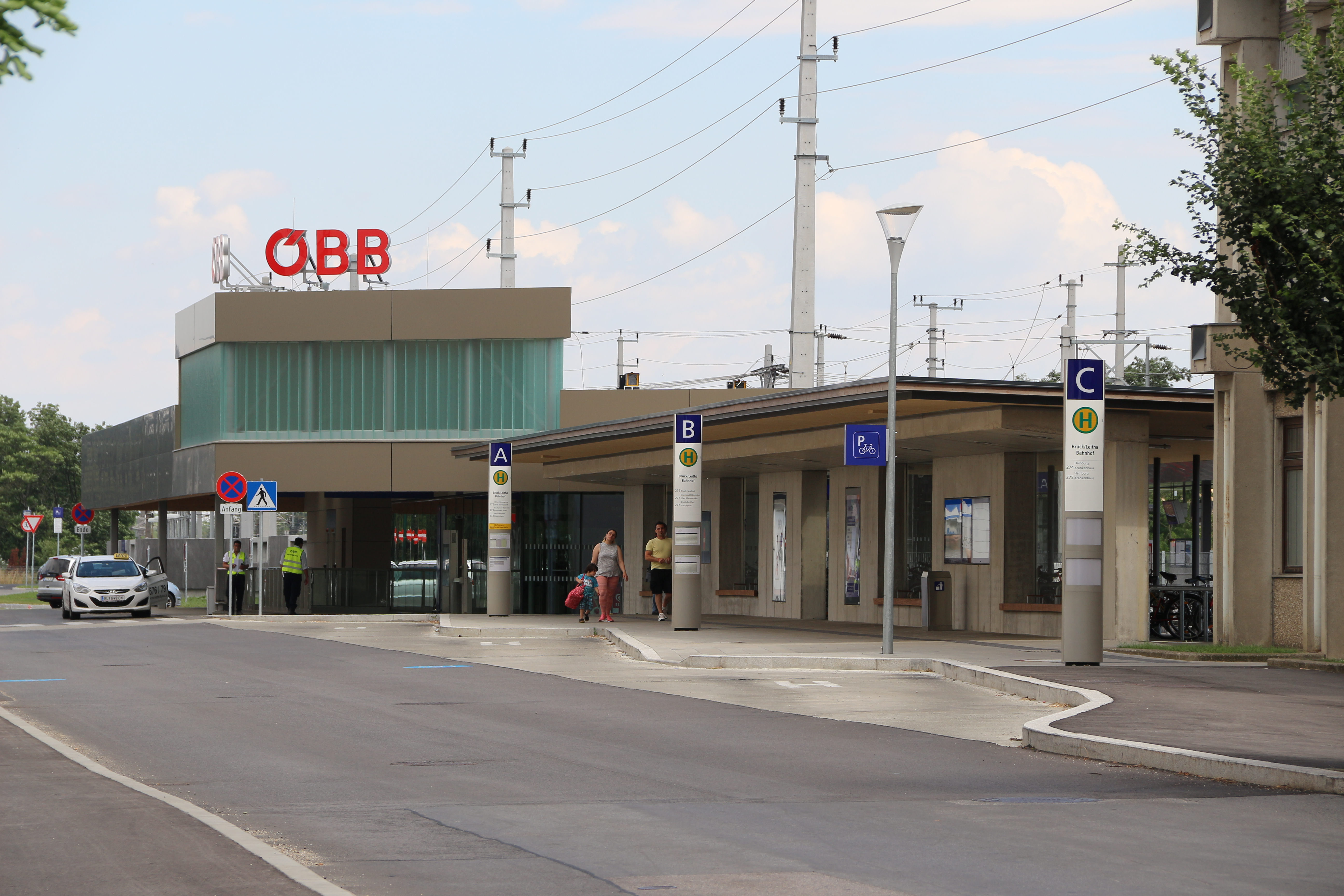 Bahnhof Bruck an der Leitha in der Nachbargemeinde Bruckneudorf, Burgenland.